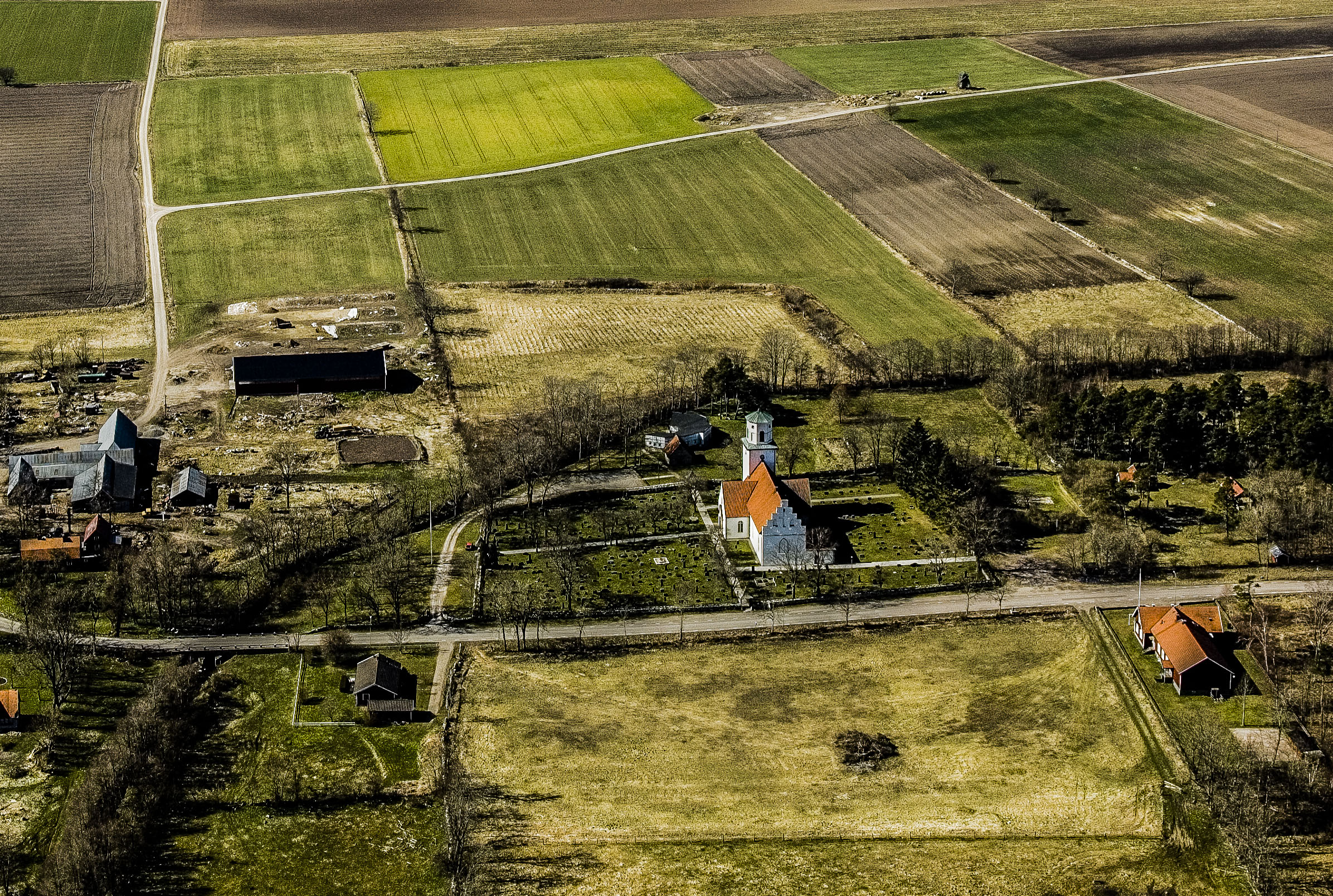 Gärdslösa ka